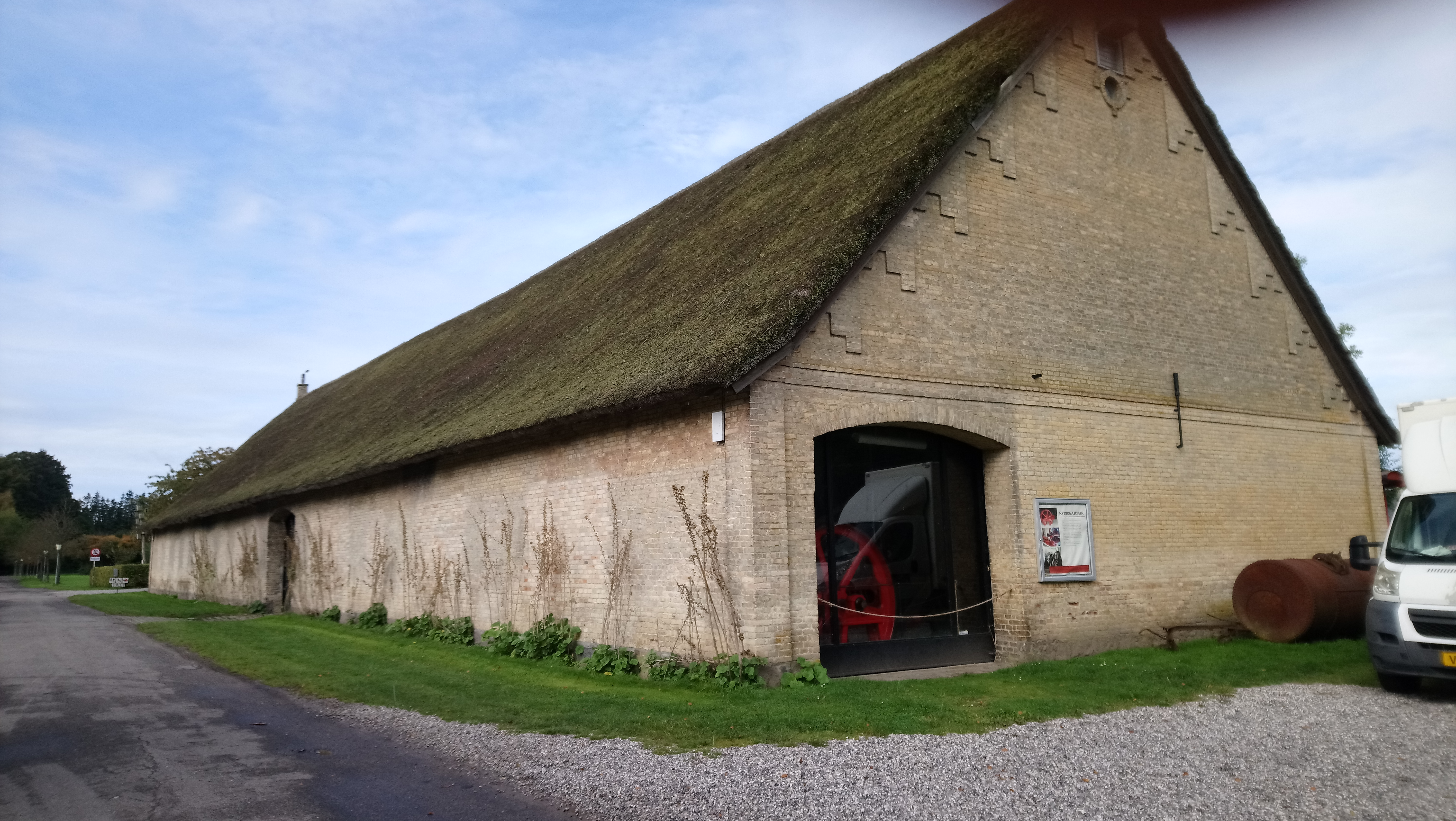 Lade opført omkring 1860. Museet fik den i 1972.